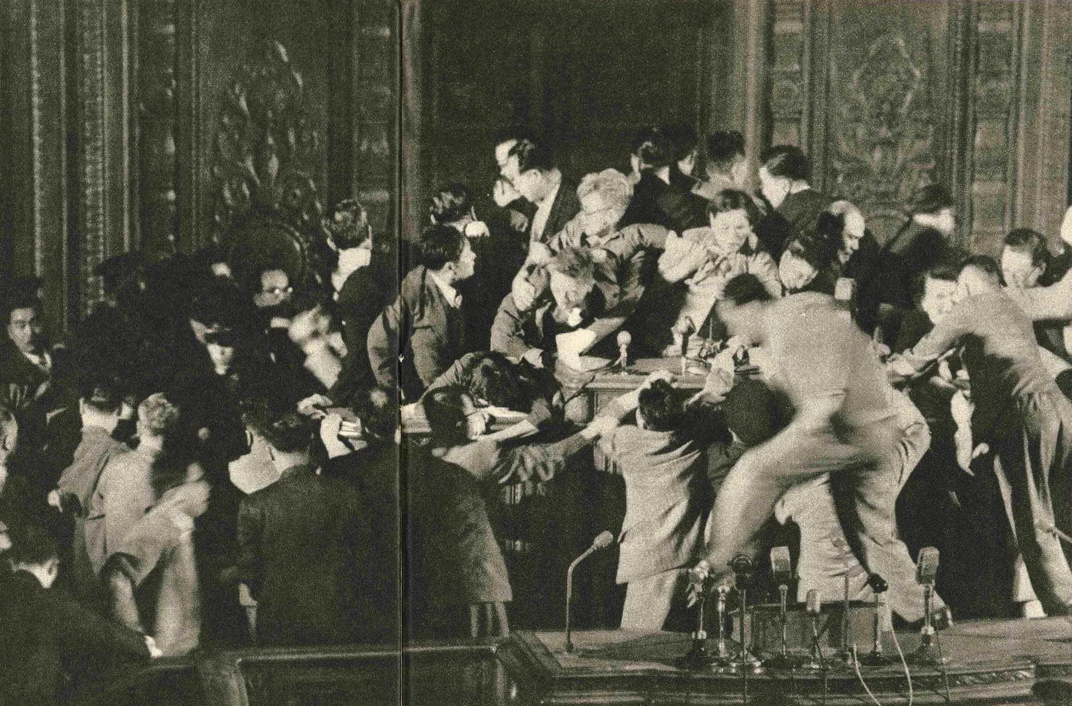 改正警察法案の審議に伴う、衆議院での乱闘（1954年6月3日）